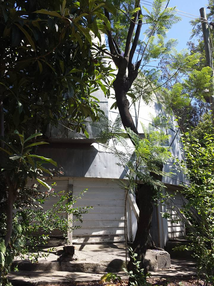 Observatorio Manuel Foster Recabarren, vista frontal.